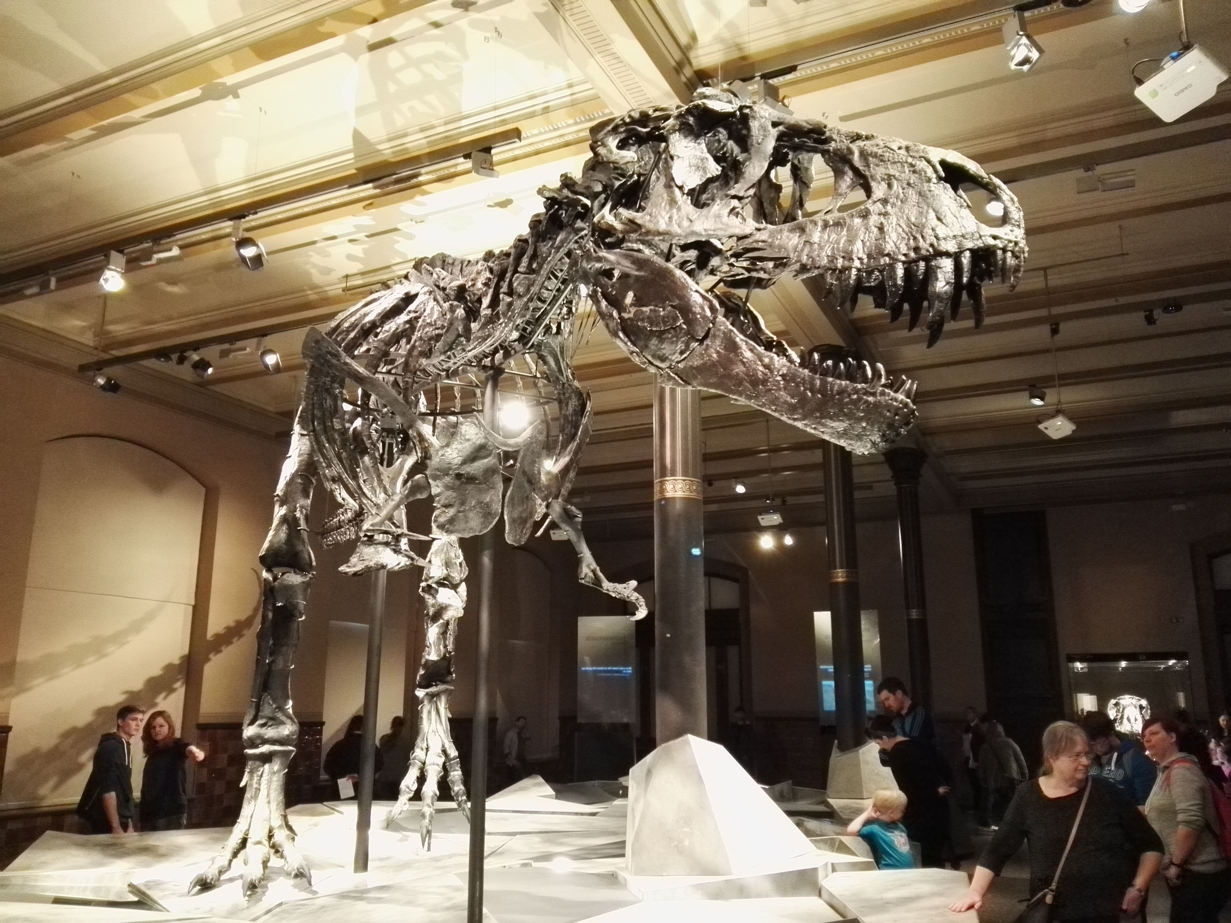 Tyrannosaurus Rex Tristan Otto im Museum für Naturkunde in Berlin